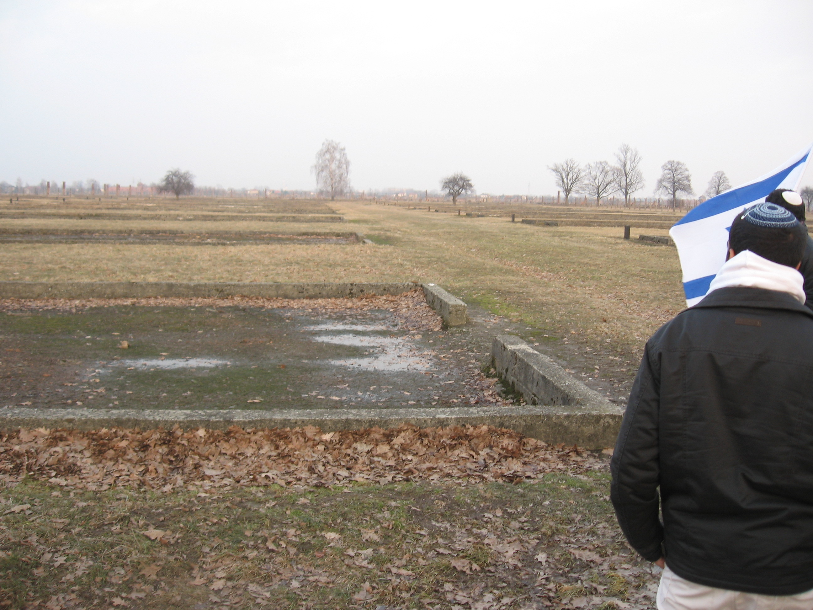 השרידים של מחסני הרכוש הגזול ליד אושוויץ שכונה "קנדה"